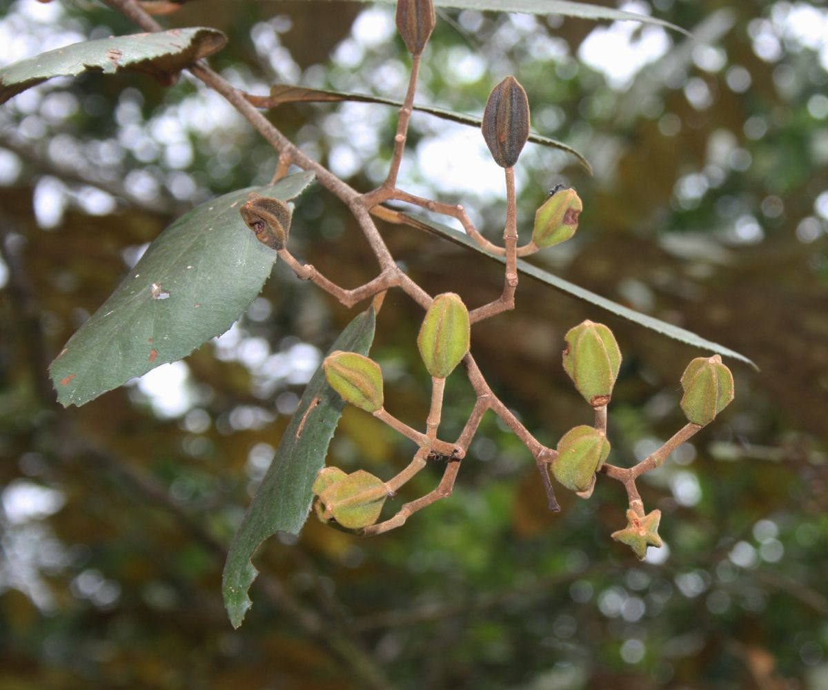 Luehea seemannii, Malvengewächse (Malvaceae), Grewioideae - Costa Rica: Prov. Puntarenas, La Gamba NW Golfito, Valle Bonito